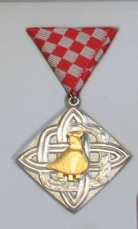 Badge of Vukovar Medal